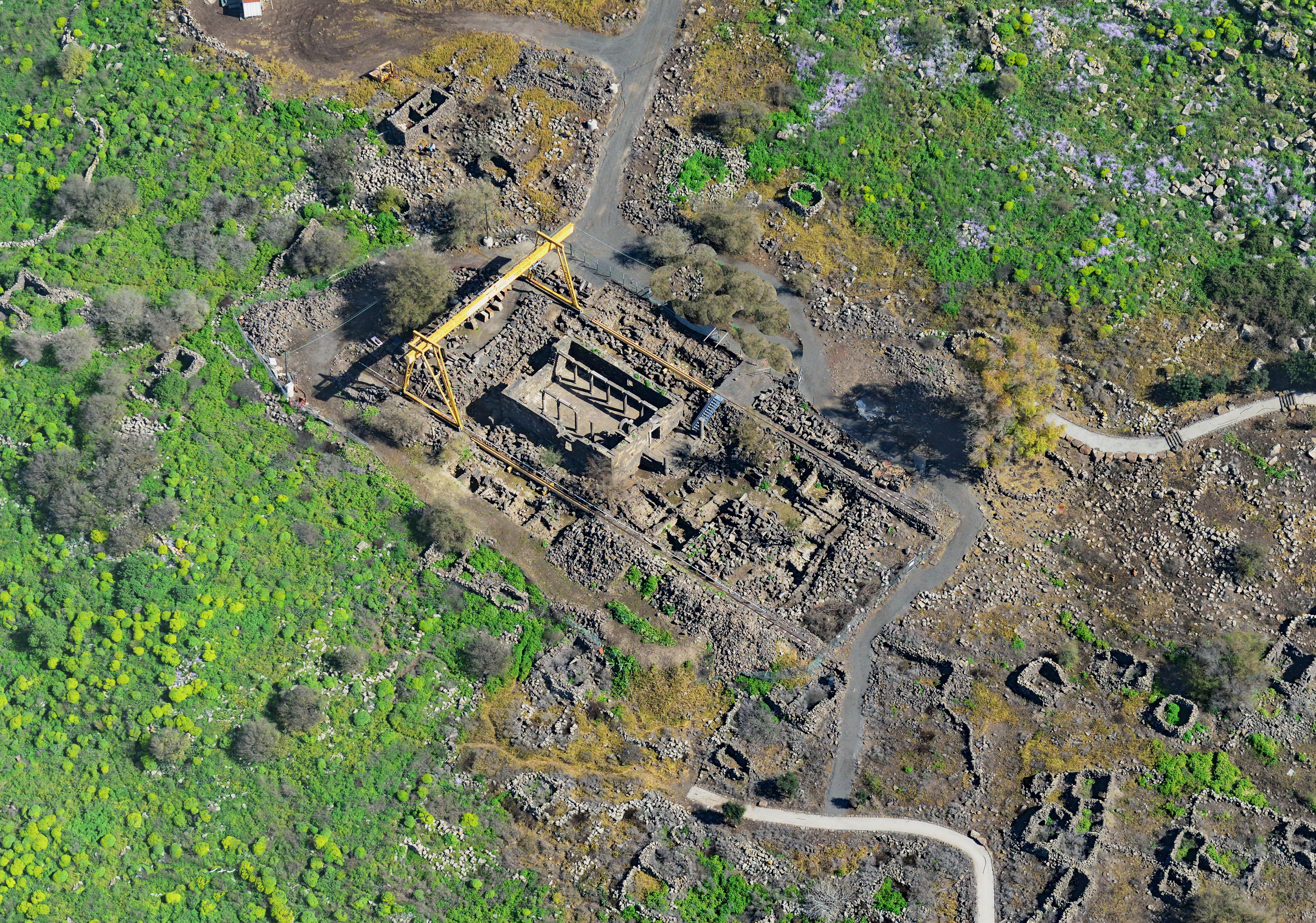 בית הכנסת העתיק באום אל-קנאטר הוא בית כנסת עתיק מתקופת המשנה והתלמוד שנחשף בדרום רמת הגולן באתר אום אל-קנאטר סמוך למושב נטור. בית הכנסת העתיק הוא מהמפוארים והחשובים מתקופה זו שנמצאו בארץ ישראל. האתר נקרא "קשתות רחבעם" על שם רחבעם זאבי שכיהן כשר התיירות כשאישר את תקציב החפירות בבית הכנסת ונרצח ימים ספורים לאחר מכן.